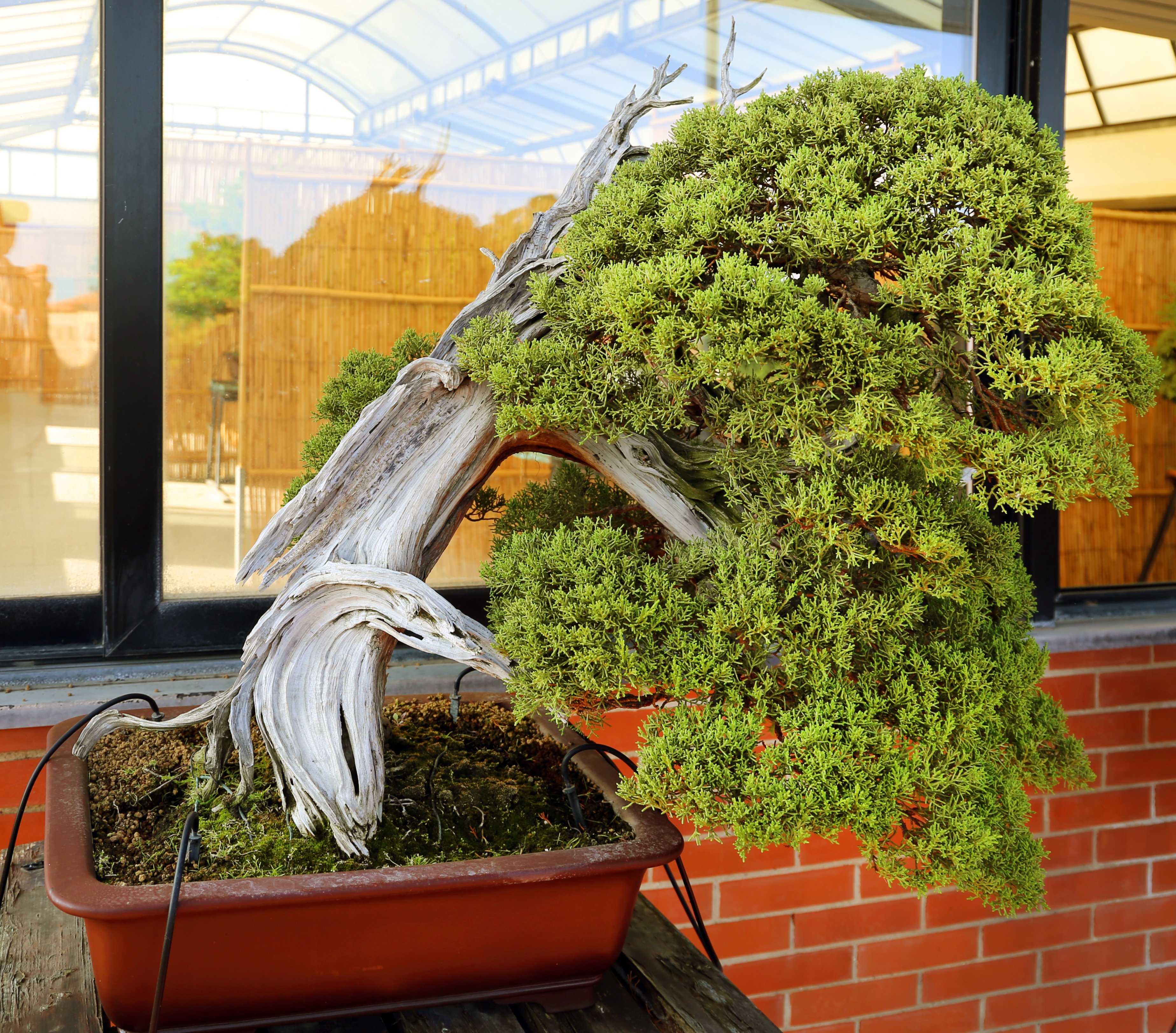 Museo del bonsai This is a photo of a monument which is part of cultural heritage of Italy.